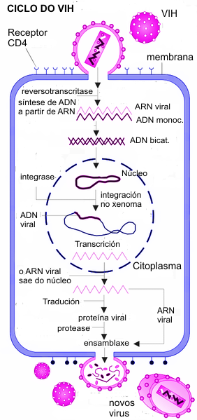 Cycle de réplication du VIH